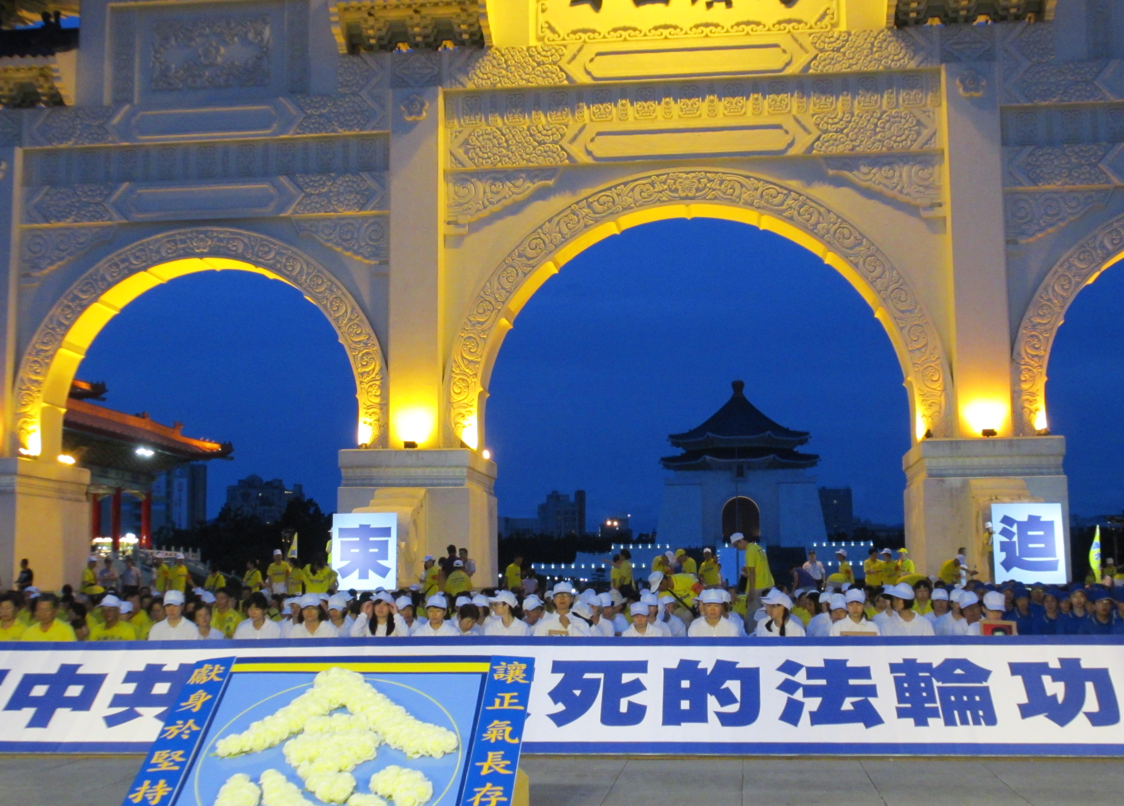 2013年7月20日，台湾法轮功学会在台北举行烛光悼念晚会要求中国政府停止迫害